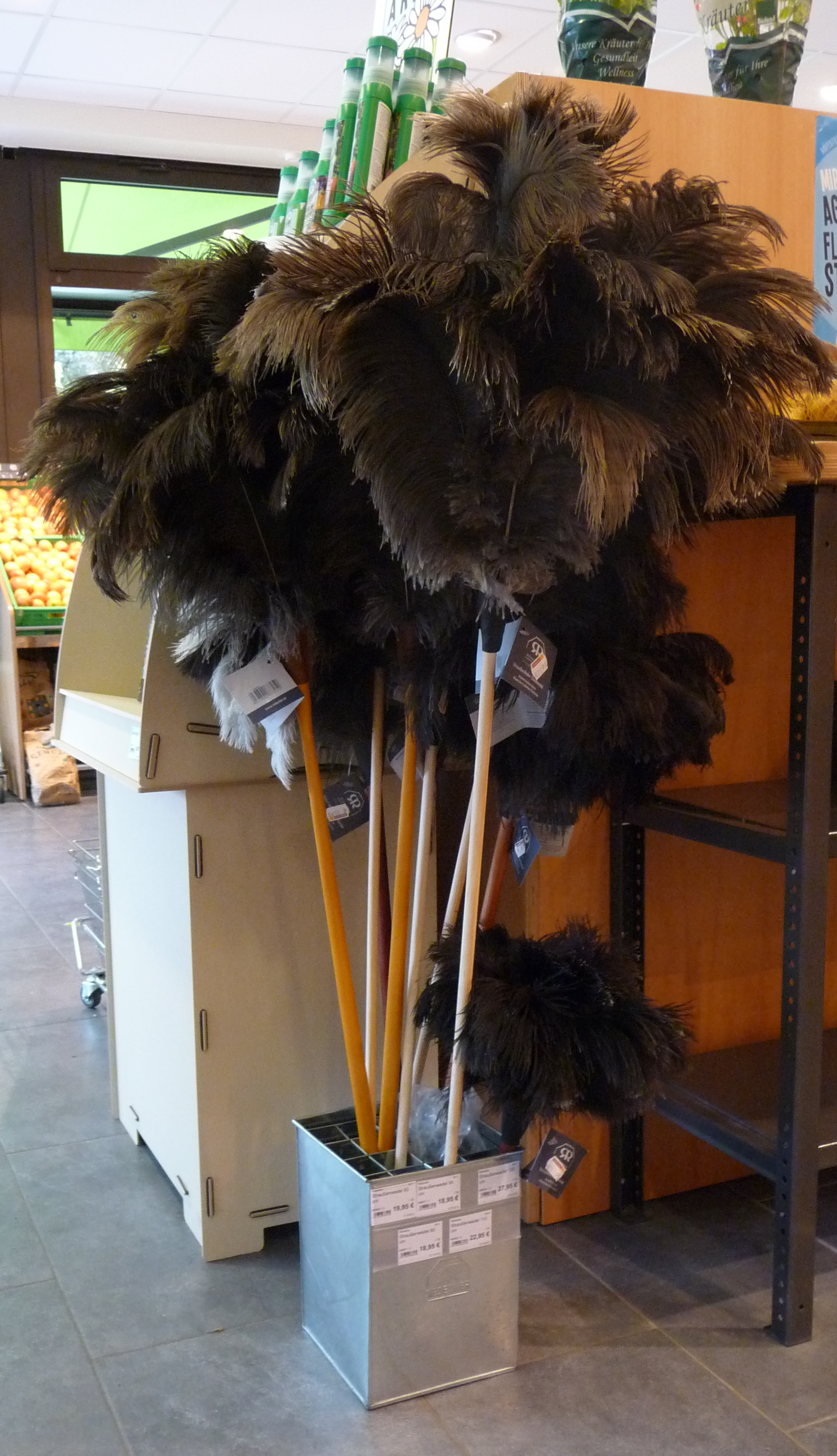 Auch heute werden noch Plumeaus verkauft. Die dienen als Staubwedel.